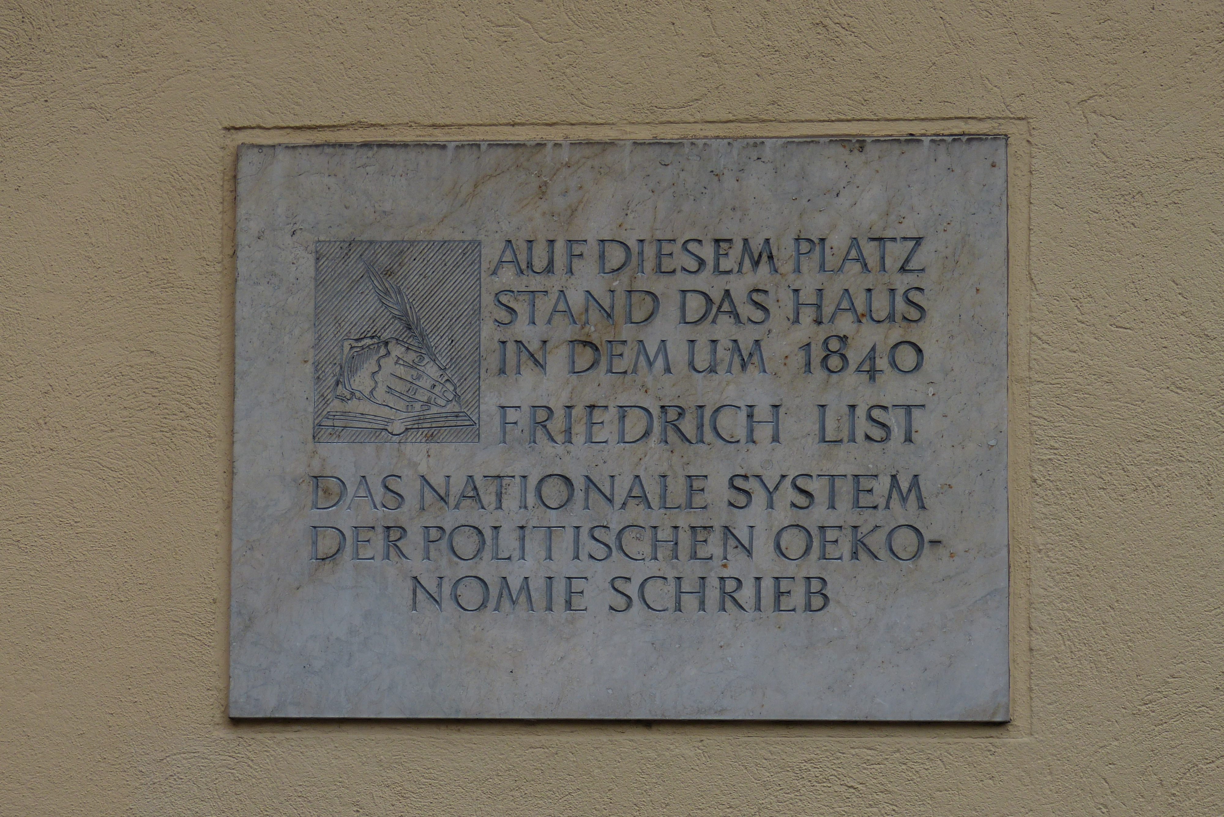 Tafel am Holbeinplatz in Augsburg: "Auf diesem Platz stand das Haus in dem um 1840 Friedrich List Das nationale System der Politischen Oekonomie schrieb"